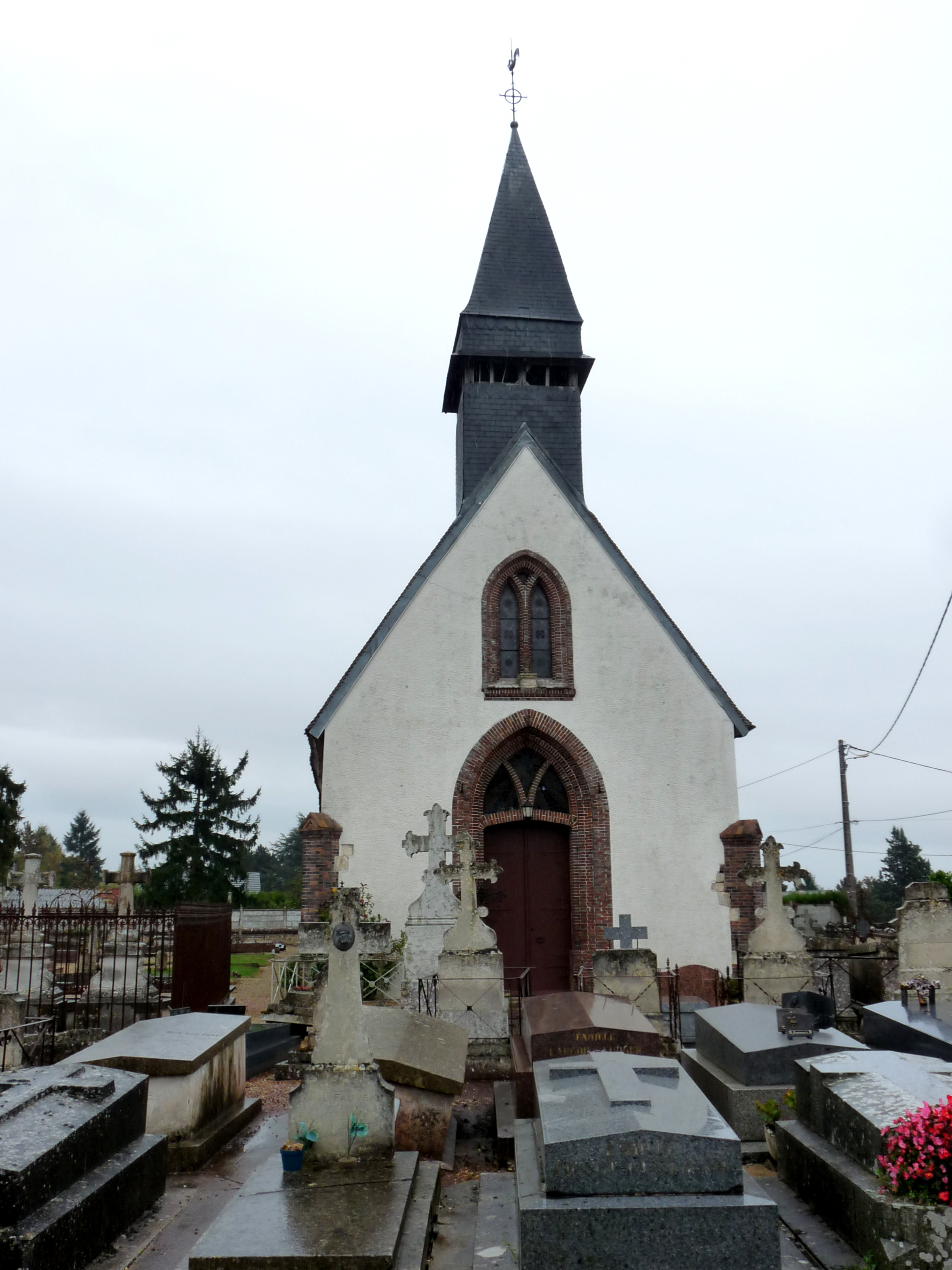 Église Sainte-Marie-Madeleine de Mesnil-sur-l'Estrée